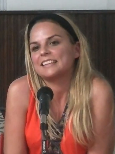 Presentación del Frente Unitario Canarias por la Paz y la Neutralidad, intervienen José Manuel Rivero, Noemí Santana y Vicente Quintana. Presenta y modera el debate Micaela Sagaseta. En la Casa Sindical de Las Palmas de Gran Canaria el 21 de junio del 2018. Parte 3